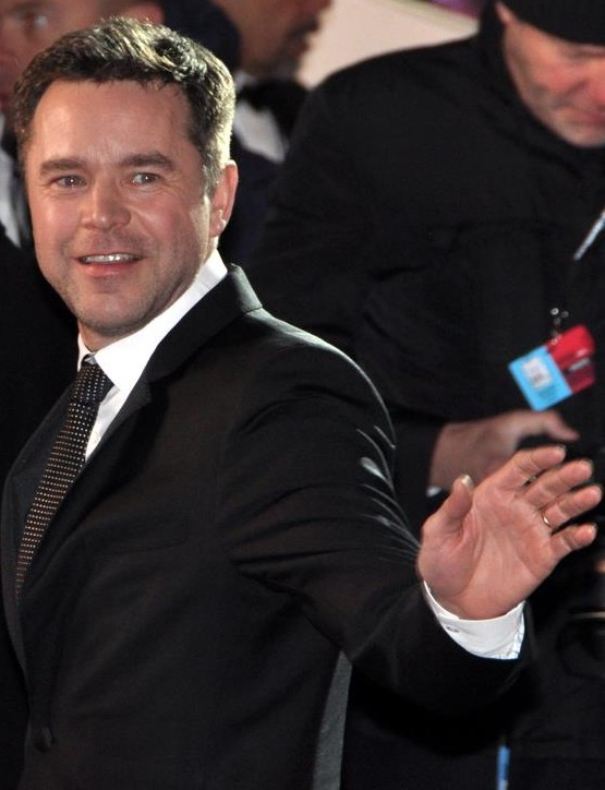 Guillaume de Tonquédec à la cérémonie des César